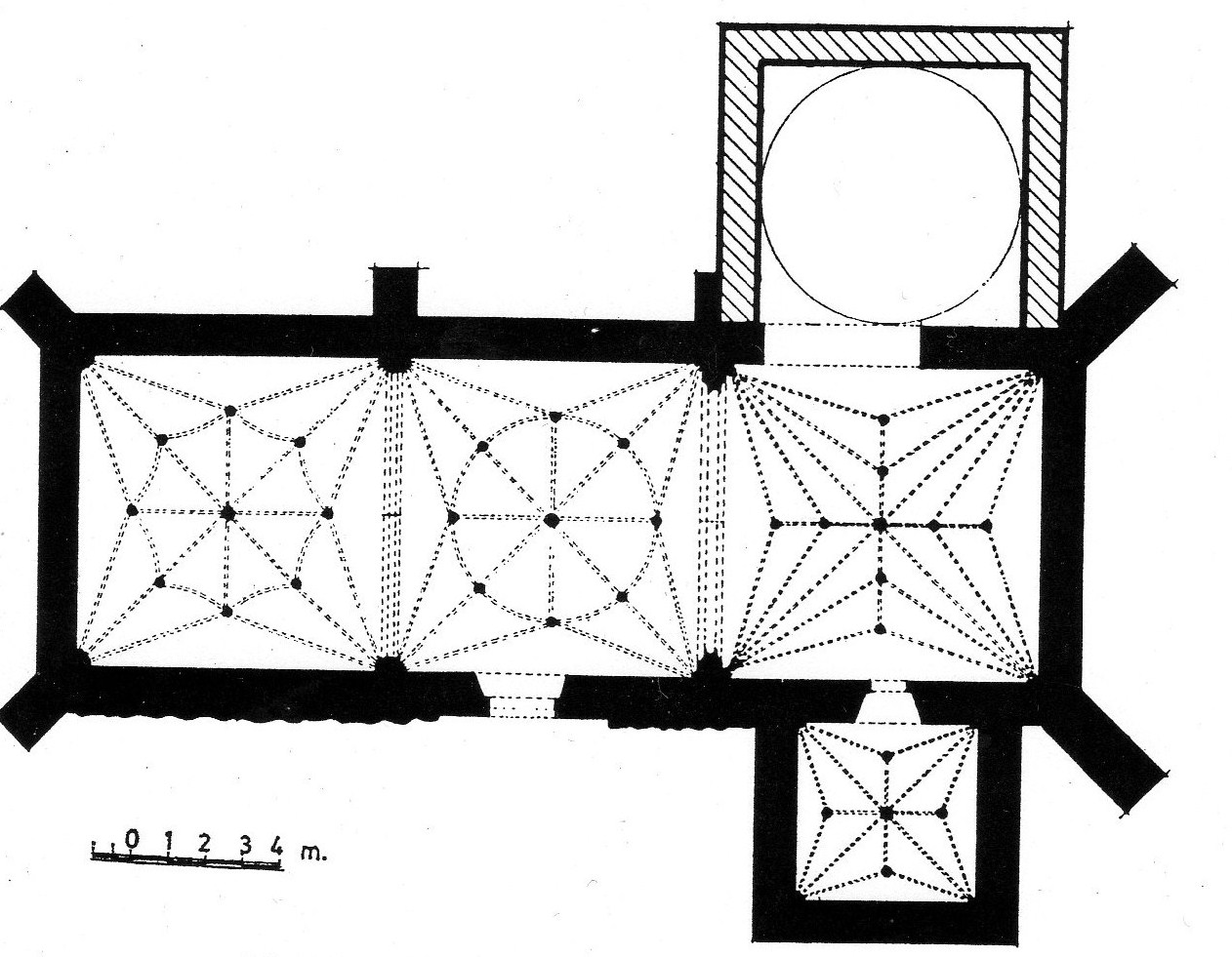 Planta arquitectónica de la Iglesia de Santa Lucía de Almarza (Soria)